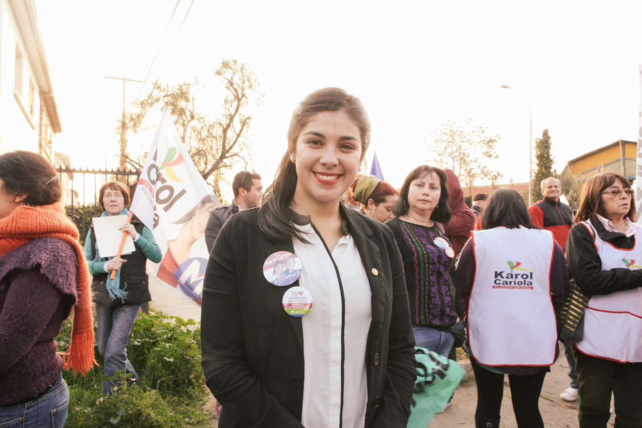 Karol Cariola durante la visita de la candidata presidencial Nueva Mayoría, Michelle Bachelet, a la comuna de Independencia, el 24 de agosto de 2013.